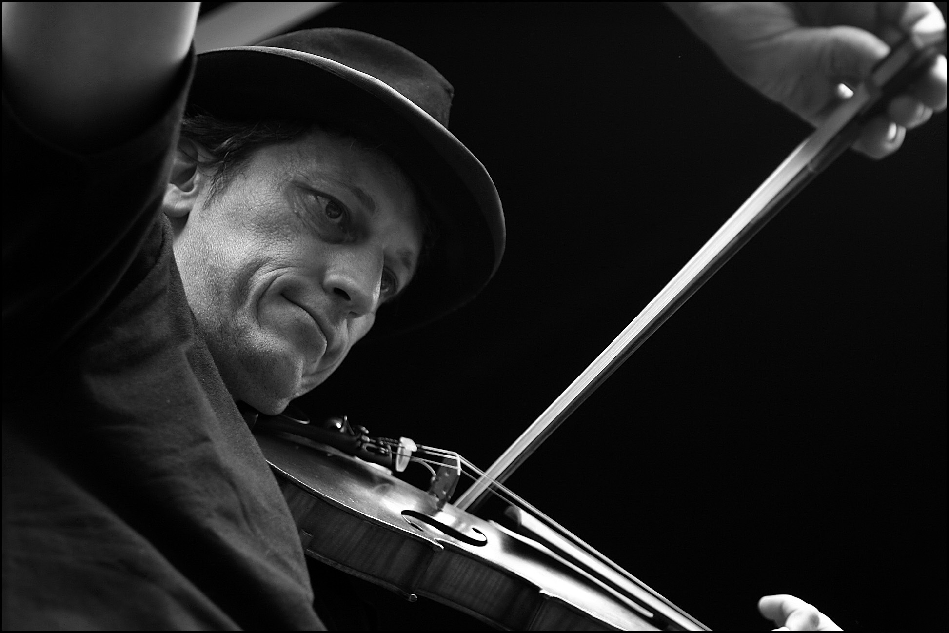 Violonist et son archet